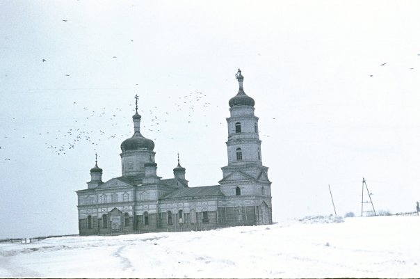 Церковь в селе Челпаново, Атяшевский район, Республика Мордовия